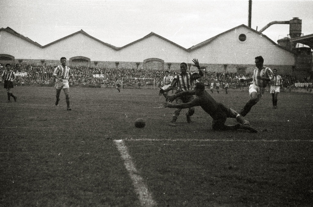 Título original: Partido de la Real Sociedad en Atotxa (14/16) Localización: San Sebastián (Guipúzcoa)